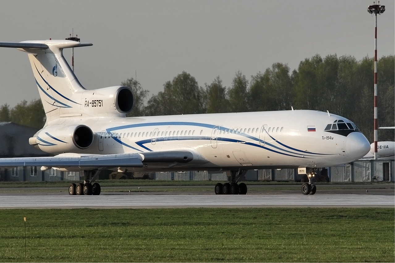 Gazpromavia Tupolev Tu-154M